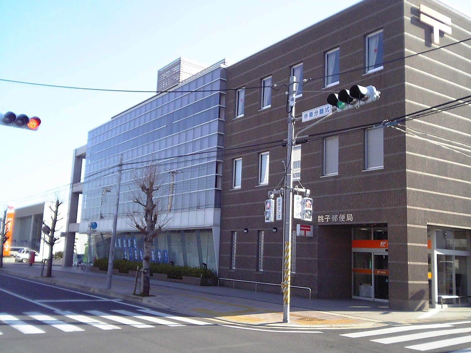 銚子郵便局